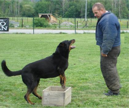 Un Berger de Beauce Image Personnelle Agailleton Catégorie:Race de chien de berger